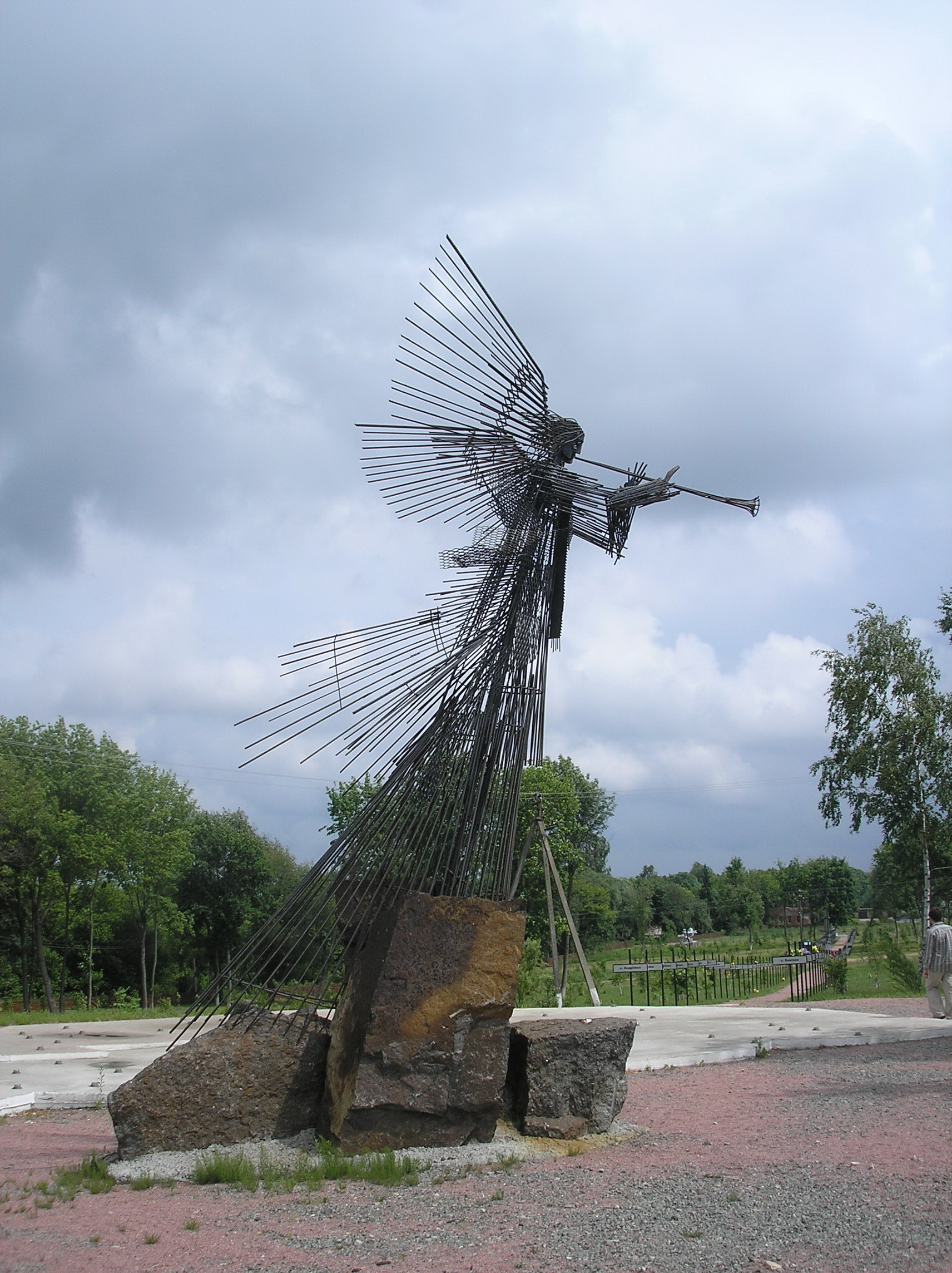 Вікіекспедиція в Чорнобиль